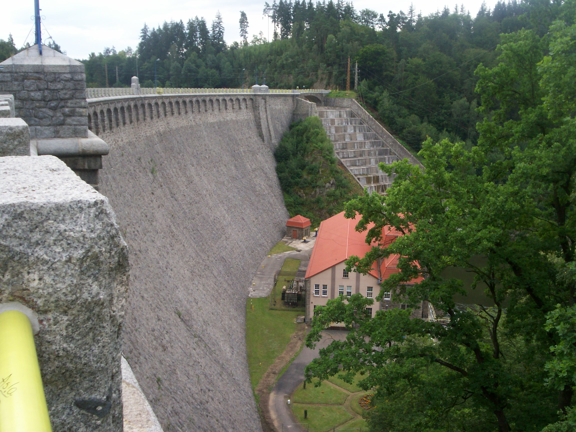 Pilchowice. Zapora i Elektrownia Wodna.